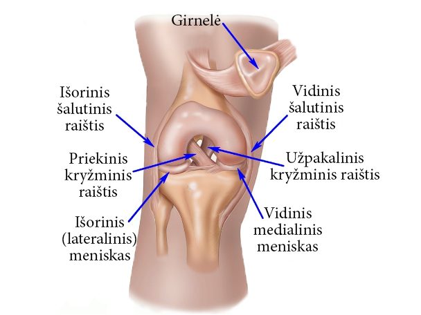 Girnelės sandara